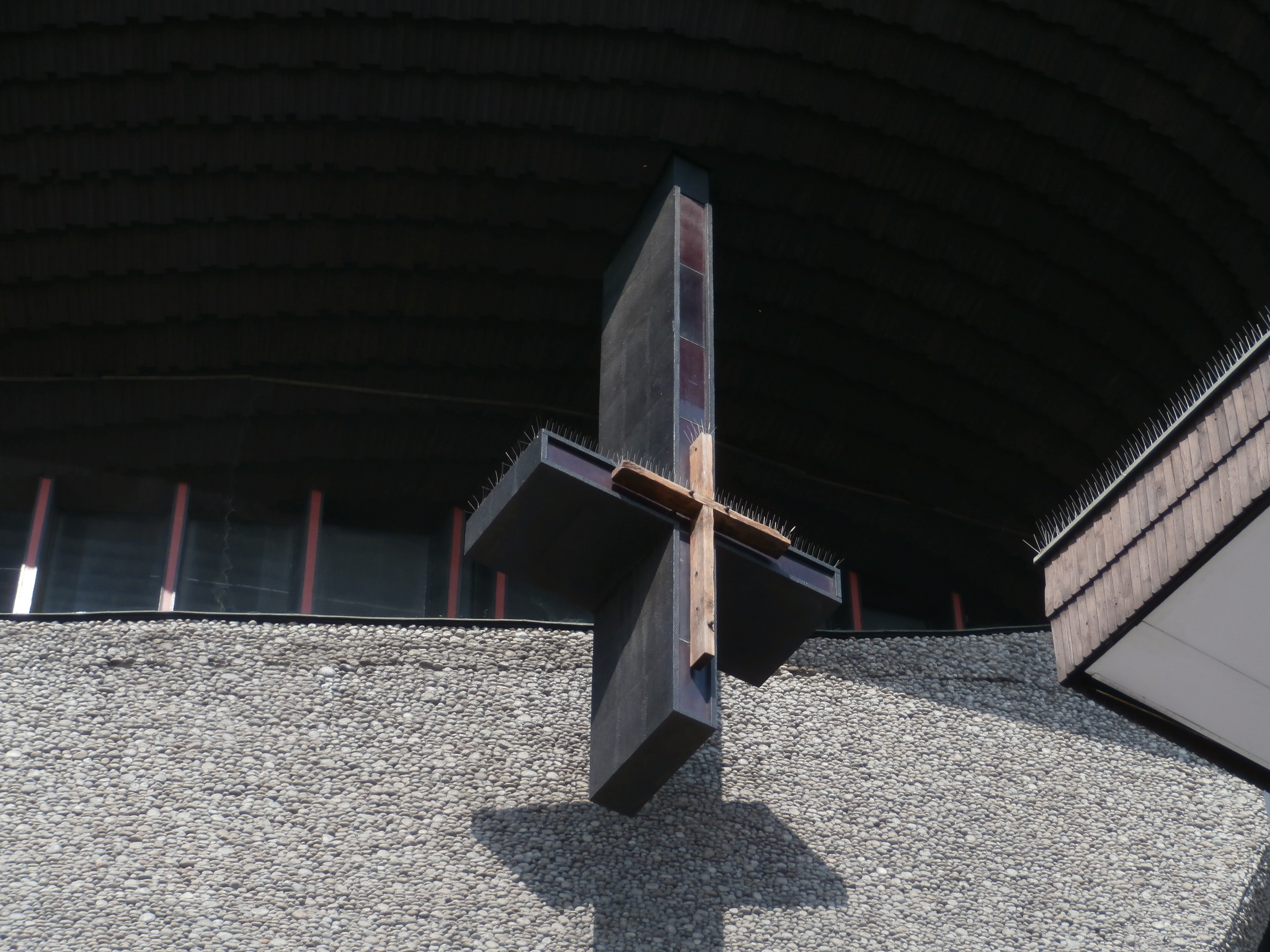 Krzyż Nowohucki (pierwszy, oryginalny) docięty do kotwicy Kościoła Arki w Krakowie-Bieńczycach.